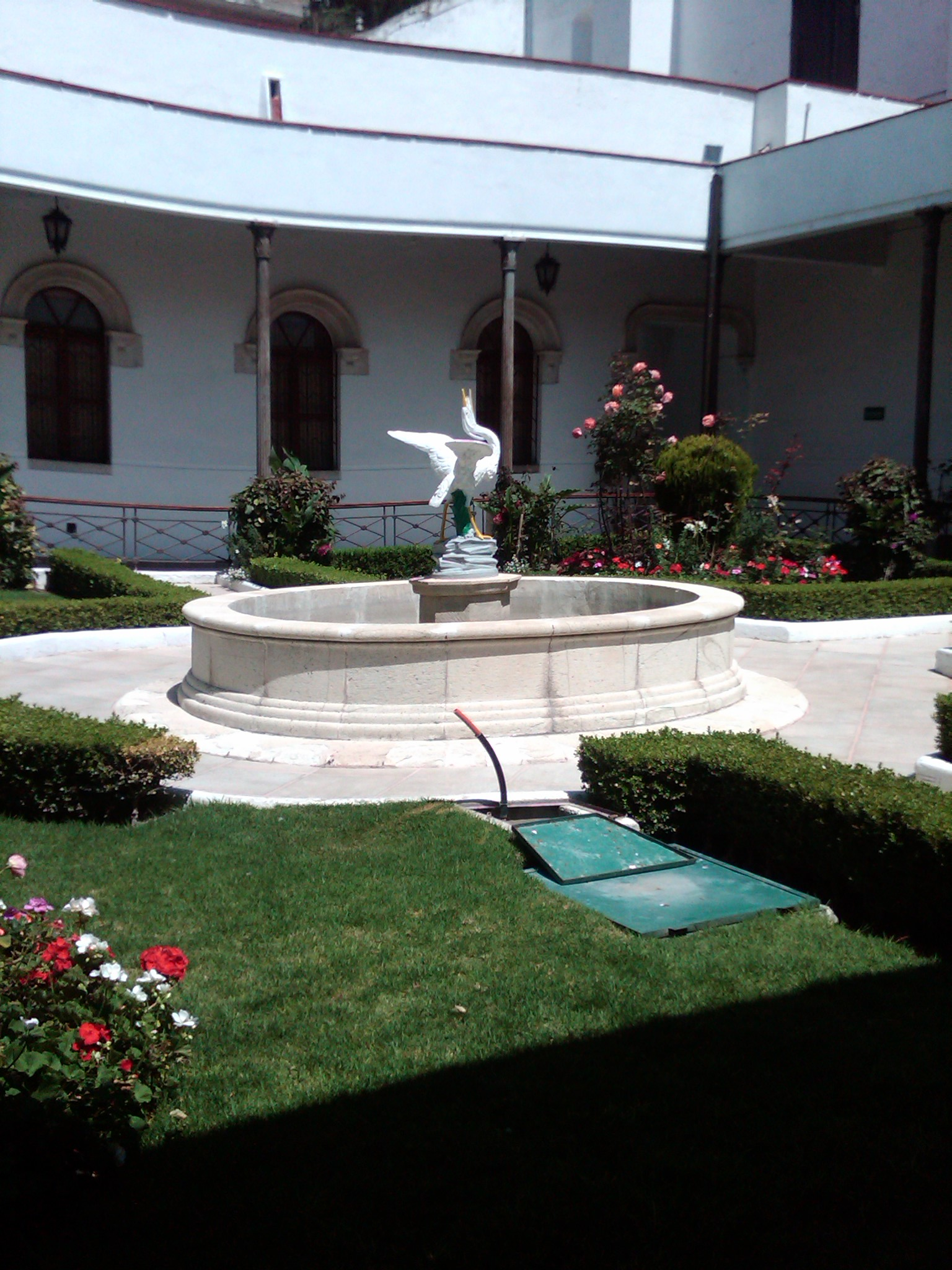 Garza UAEH